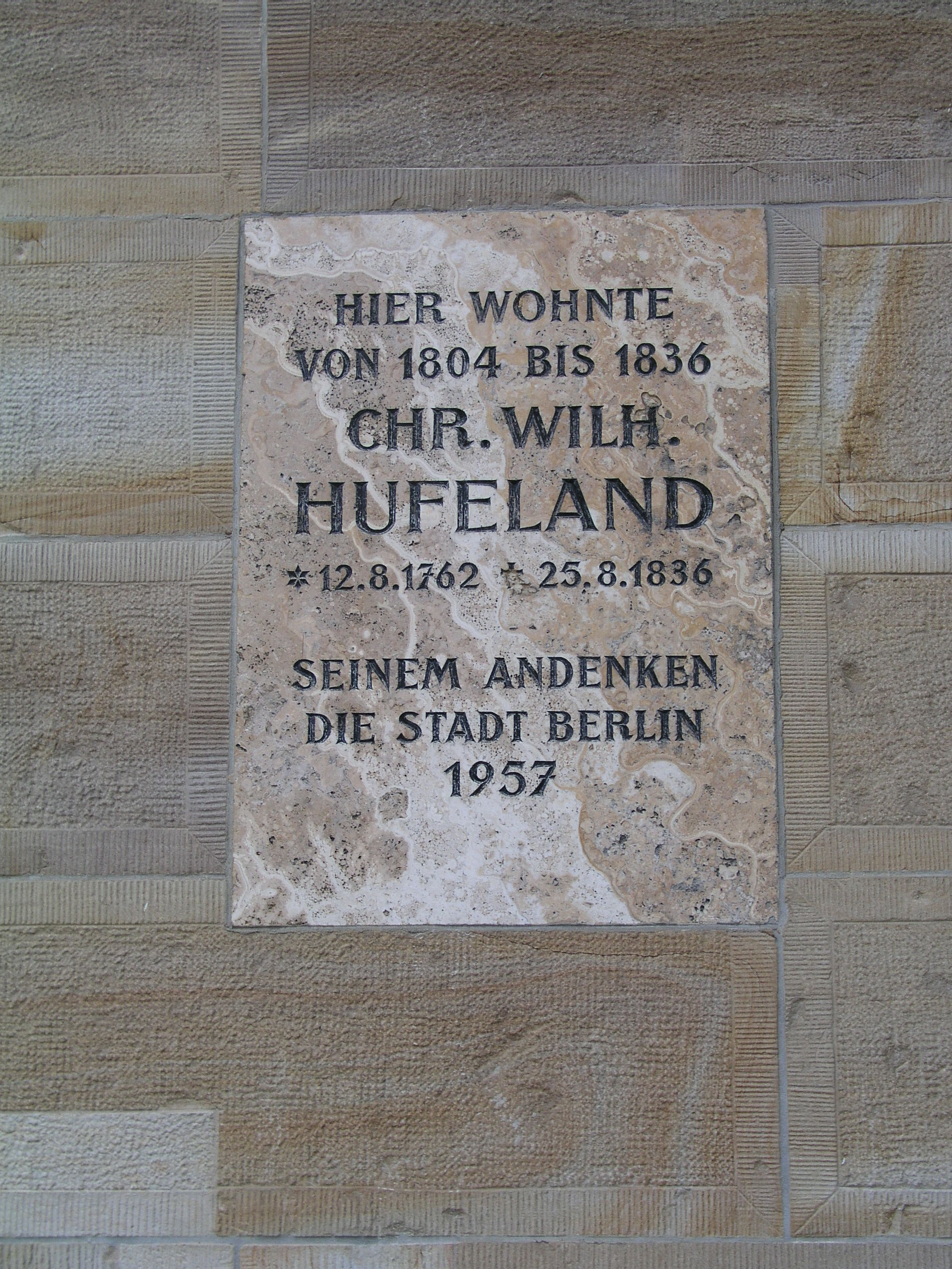 Gedenktafel für Hufeland in Berlin-Mitte, Bauhofstraße